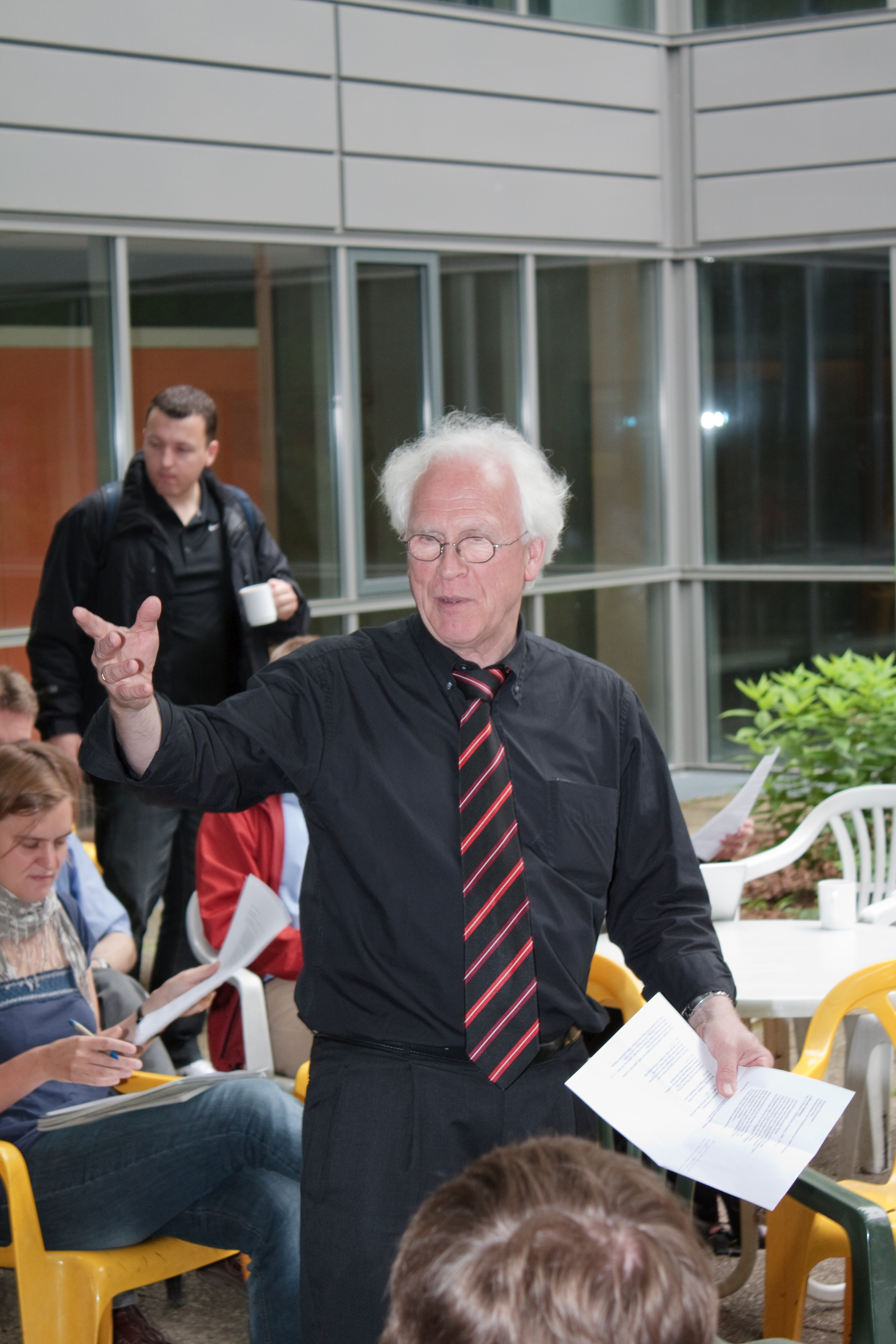 Hermann Spieckermann, Professor für Altes Testament an der Universität Göttingen, während einer Vorlesung.